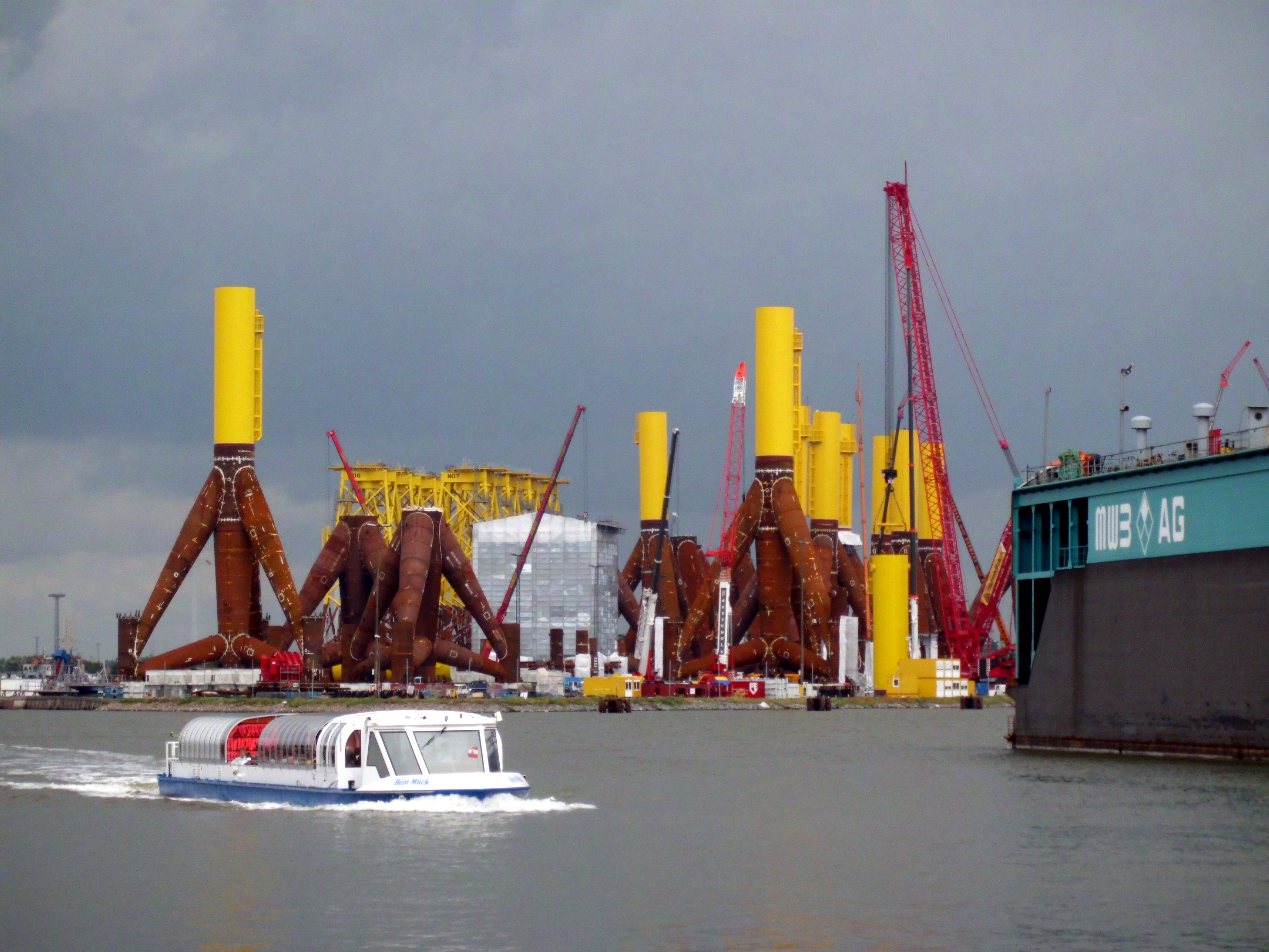 ABC-Halbinsel im Kaiserhafen